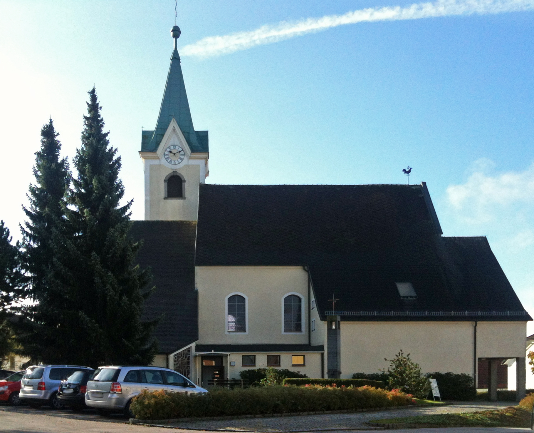 Kath. Pfarrkirche hl. Ulrich